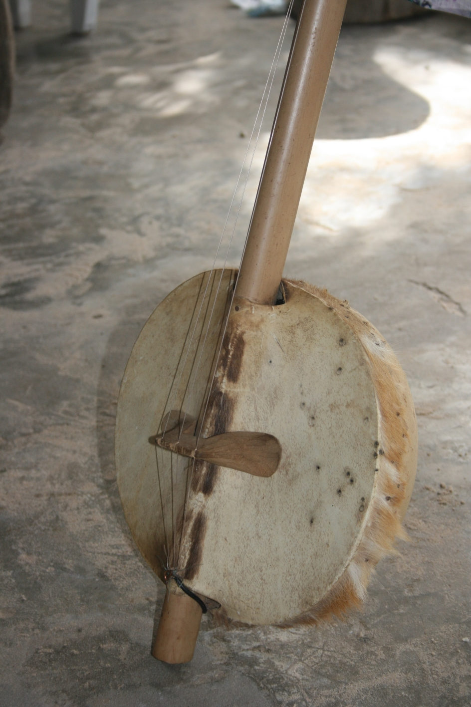 L’écontine, instrument de musique traditionnelle des Diolas en Casamance (Sénégal)